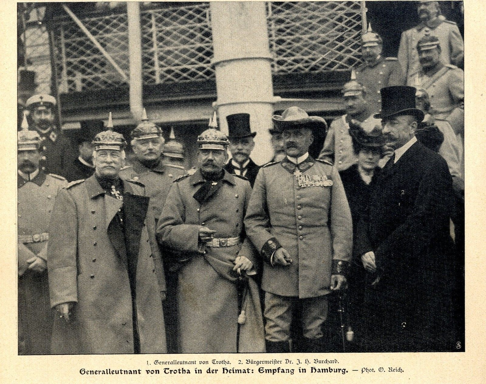 Generalleutnant Lothar von Trotha wird vom Hamburger Bürgermeister Johann Heinrich Burchard empfangen, 1905